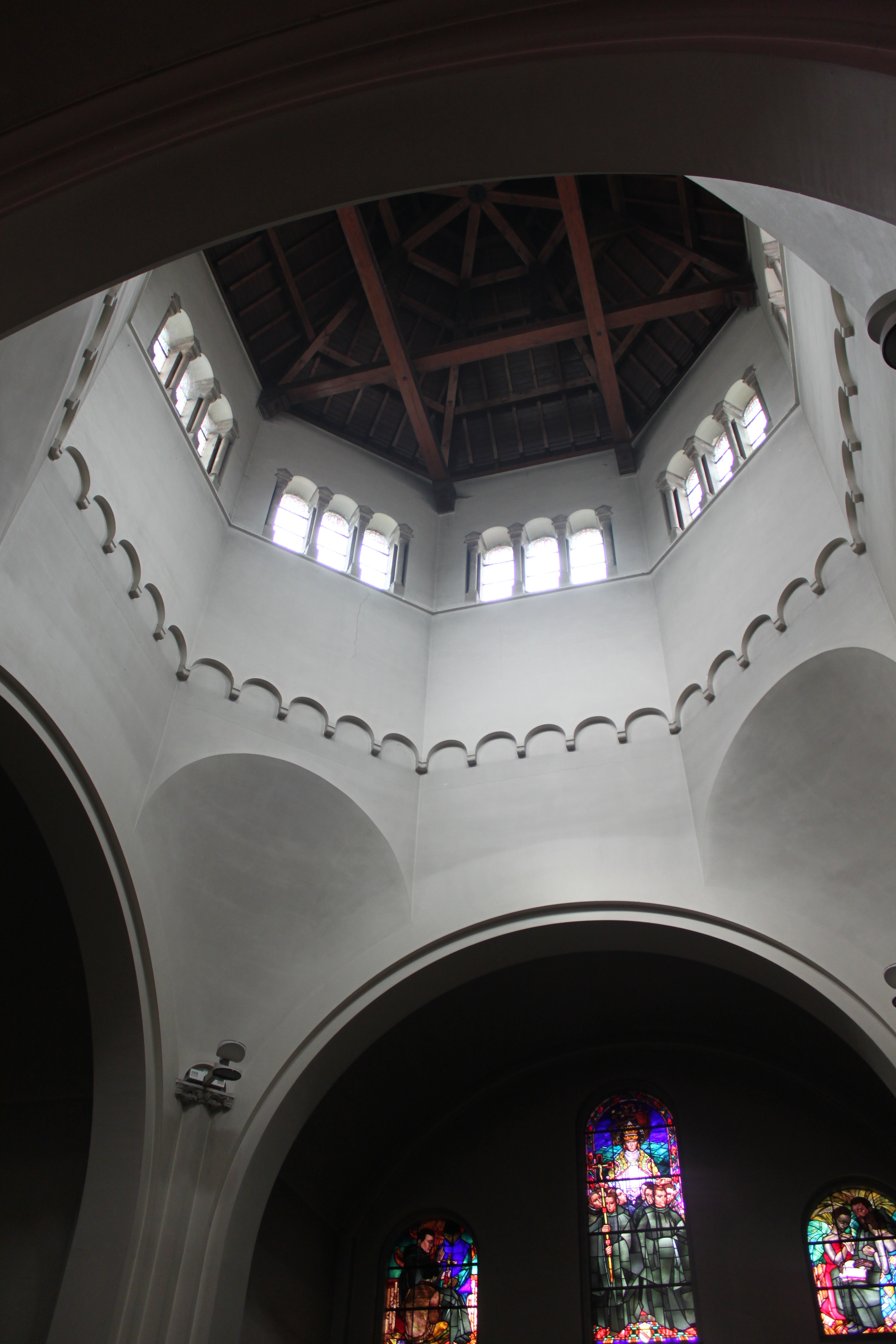 The main dome of Sint-Andriesabdji, Zevenkerken.